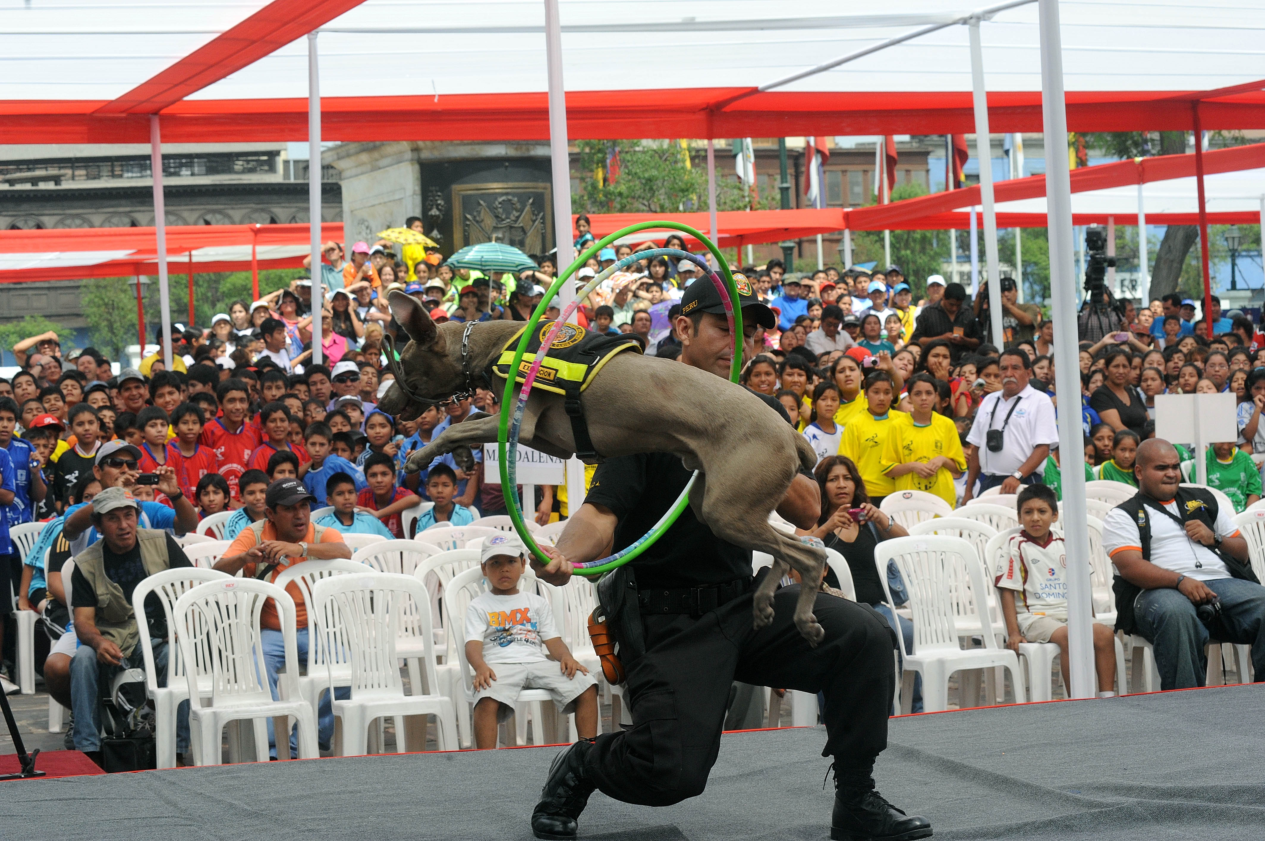 Perros entrenados por la Policía Canina realizaron esta mañana una exhibición, como antesala a la inauguración del "Campeonato Interbarrios 2012", que fue inaugurado por el presidente del Congreso, Daniel Abugattás.